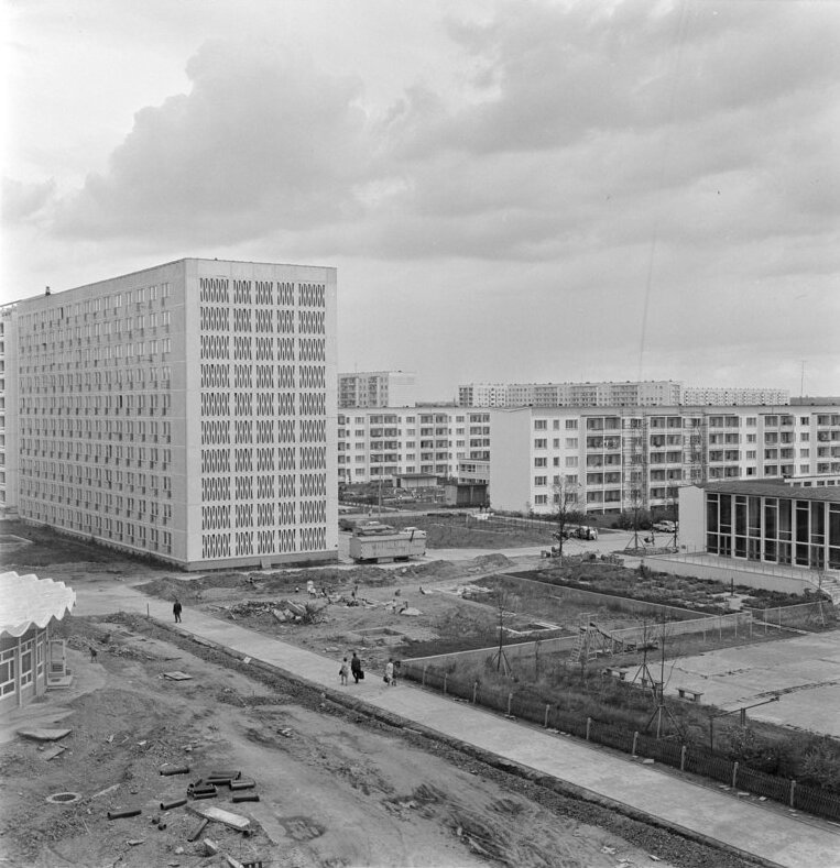 Zentralbild / Voigt / 9.9.69 / ku / Halle-Neustadt: Die junge Stadt Halle-Neustadt mit 25.000 Einwohnern und 9.000 Wohnungen hatte im Juli den 5. Jahrestag der Grundsteinlegung und den 2. Jahrestag der Verleihung der Stadtrechte. Unser Panorama zeigt in der Bildmitte den interessanten Delta-Kindergarten, der nach einer neuen Bauweise errichtet wurde. Information added by Wikimedia users."Block 10", später Block 618 bis 621, Adresse heute: Zerbster Straße 25-43, 06124 Halle (Saale). Originale Beschreibungen von Bild 183-F0802-0013-001: "...die Montage des längsten Wohnblocks der DDR am 31.7.67 beendet. Das 385 m lange zehngeschossige Gebäude wuchs in rund sechs Wochen empor. Die Montage-Arbeiter verbauten dabei 23000 Elemente im Gesamtgewicht von 100000 Tonnen. Der Wohnriese bietet in 320 Mehrzimmer- und 536 Einraumwohnungen Platz für rund 2000 Menschen. Ein Dachgarten wird noch angelegt; einige Räume werden zu einer Kinderkrippe mit 160 Plätzen ausgebaut. Beim Bau des Blocks hat sich das Kiewer Beispiel ausgezeichnet bewährt." Im Vordergrund der 1968 erbaute kreisförmige Deltakindergarten "Buratino", dessen Dach aus den von H. Müller entwickelten Delta-HP-Schalen besteht. Der Begriff 'Delta' bezieht sich auf den konischen Verlauf der Betonschalen.